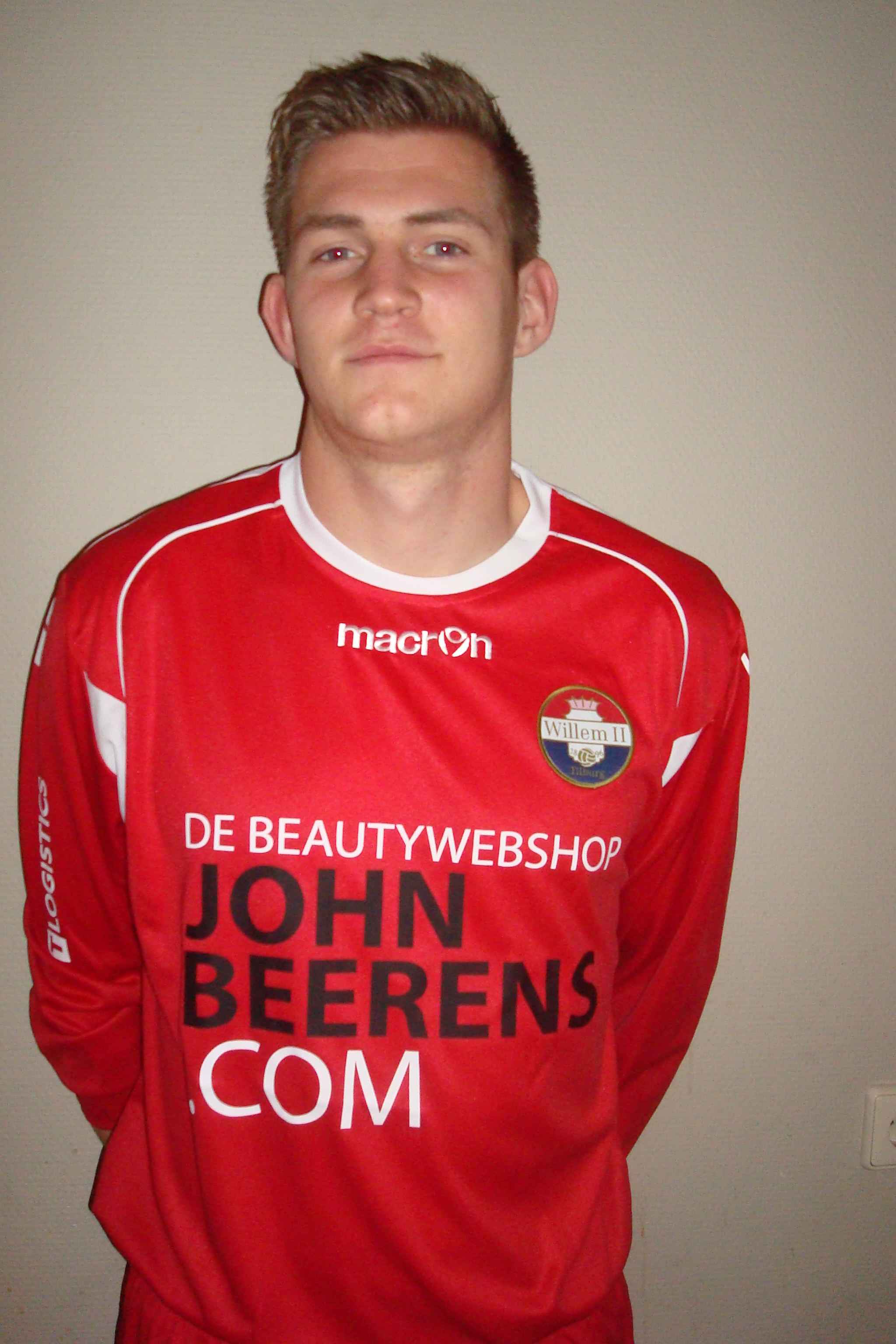 Mattijs Branderhorst in het shirt van Willem II seizoen 2013/2014